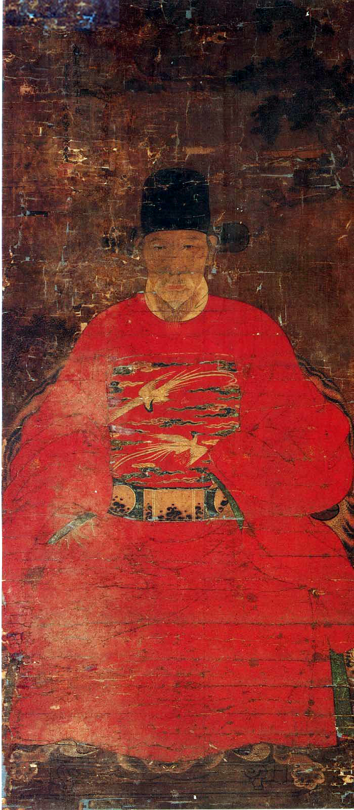 中文（香港）: 曾鯨繪顧起元像，绢本设色 画幅尺寸107×47厘米，款题“顾起元先生小照，甲申秋日波君曾鲸恭绘”。